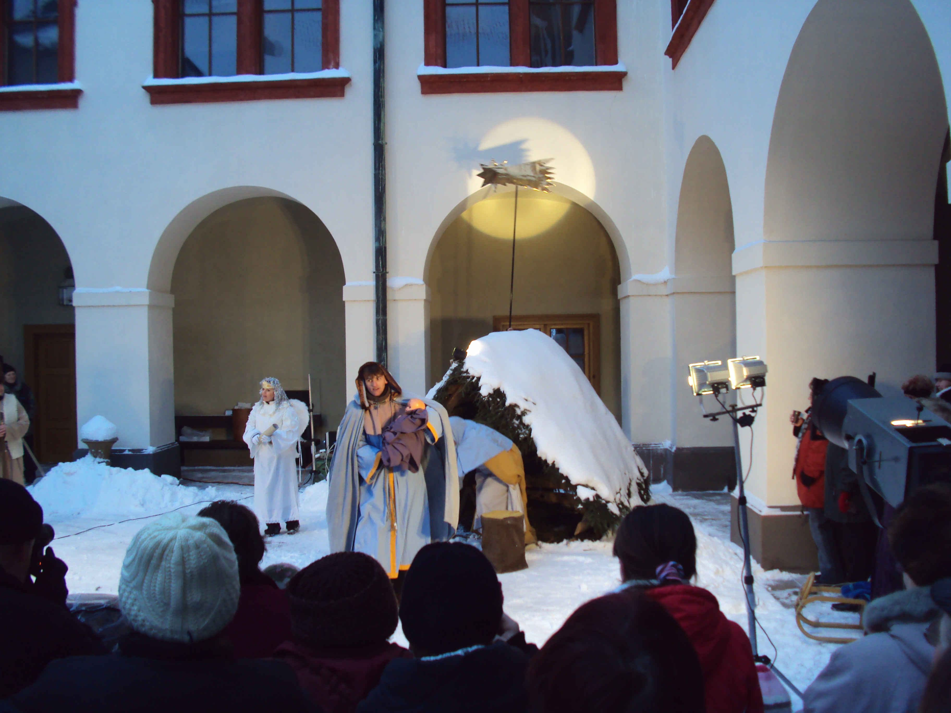 Představení ochotníků souboru Havlíček Živý betlém na nádvoří zámku Zákupy